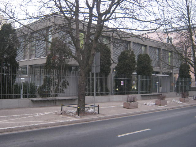 Budynek Ambasady Finlandii w Warszawie (ul. Chopina 4-8).